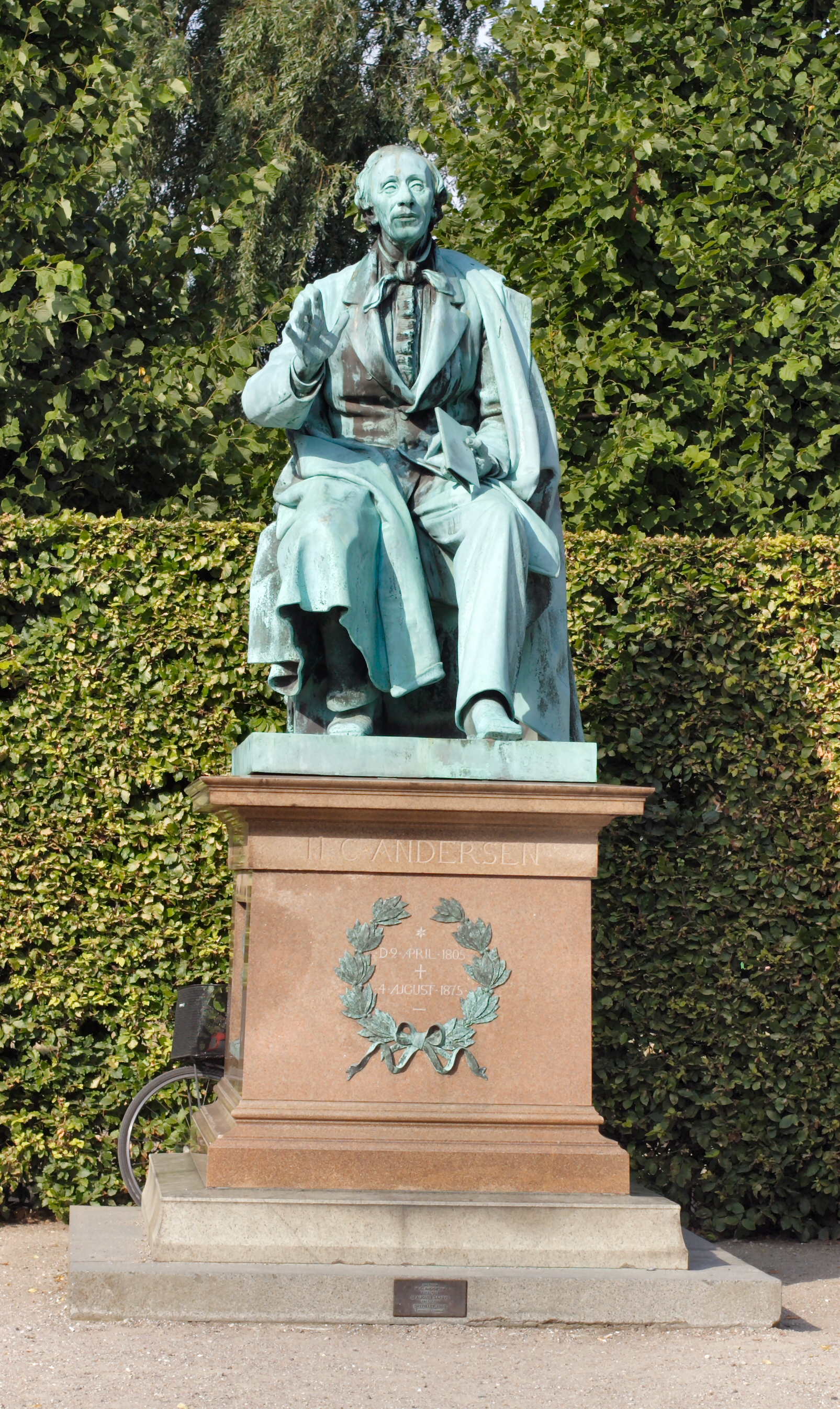 H.C. Andersen statue i Kongens Have i København